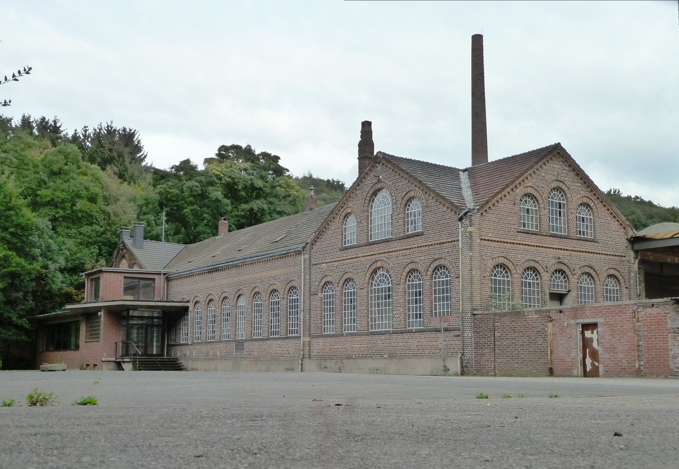 Fabrikgebäude der Firma Brackelsberg in EnnepetalThis is a photograph of an architectural monument., no. 0